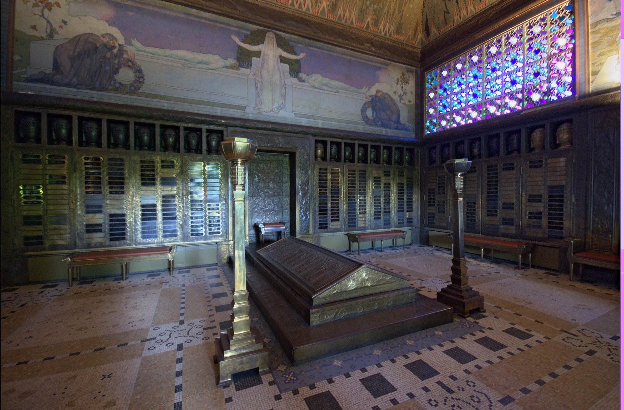 La Chaux-de-Fonds, crématoire Art Nouveau L'Eplattenier, intérieur